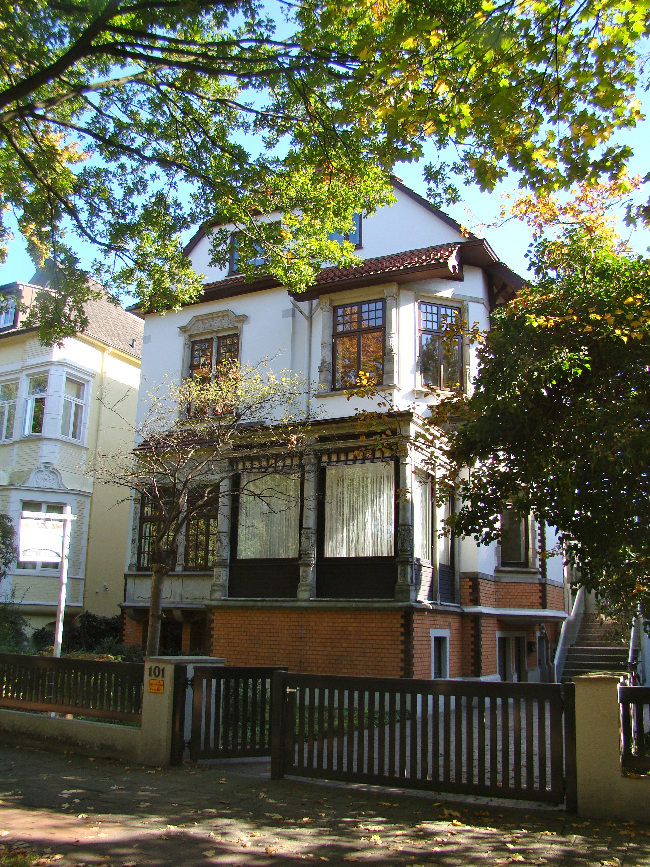 Villa Dunkel in Bremen, Parkallee 101.Das abgebildete Objekt ist ein geschütztes Kulturdenkmal in der Freien Hansestadt Bremen, mit der Nr. 1000 beim Landesamt für Denkmalpflege registriert.